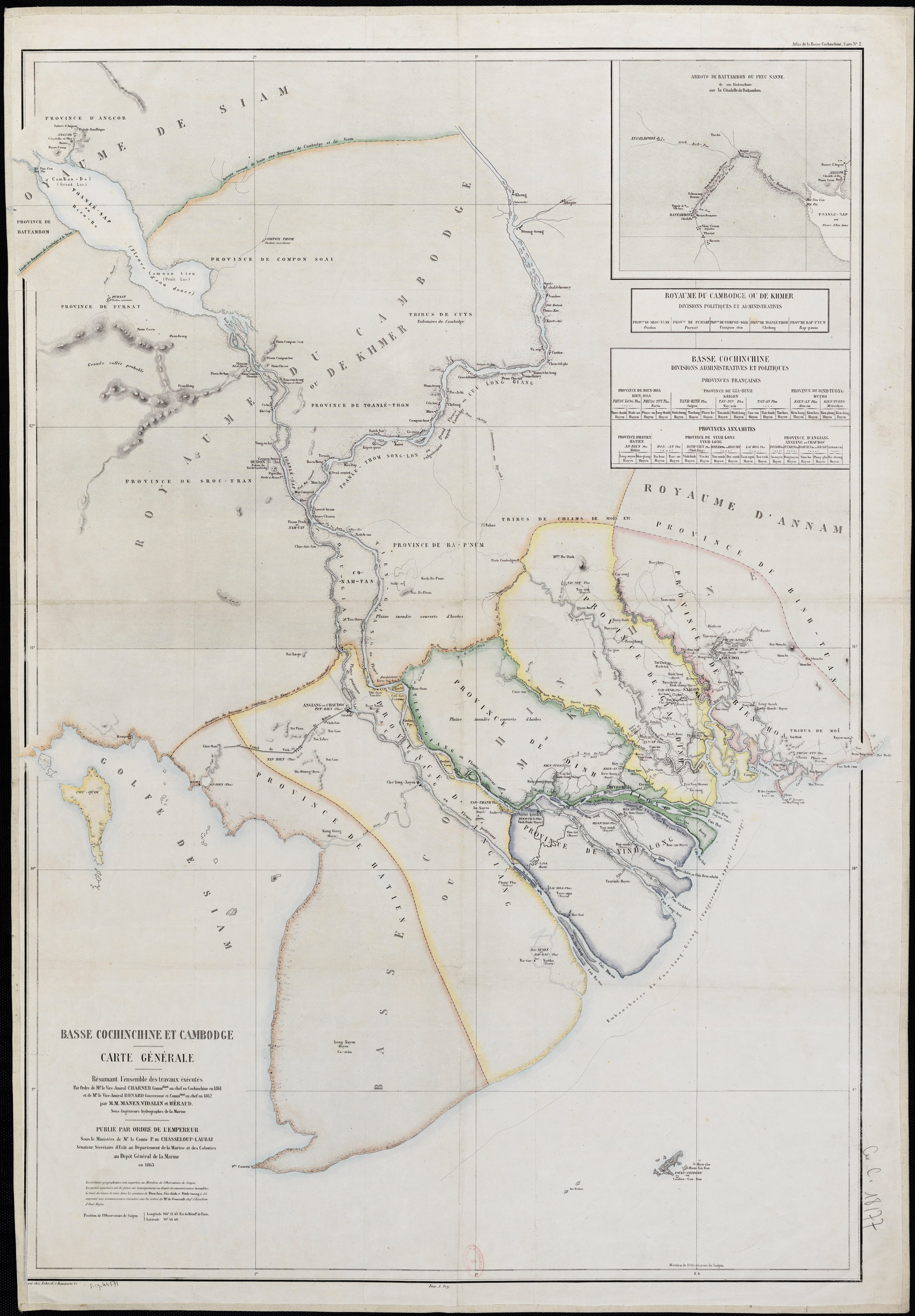 Bản đồ hành chính Nam Kỳ Lục tỉnh năm 1863, với 3 tỉnh miền đông là Gia Định, Định Tường và Biên Hòa đã thuộc Pháp, còn 3 tỉnh miền tây là An Giang, Vĩnh Long, Hà Tiên vẫn thuộc Đại Nam.